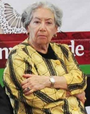 Entrega de la medalla Gonzalo Aguirre Beltrán al Dr. J. Jesús María Serna Morales el 10 agosto de 2012 por el Instituto Veracruzano de la Cultura